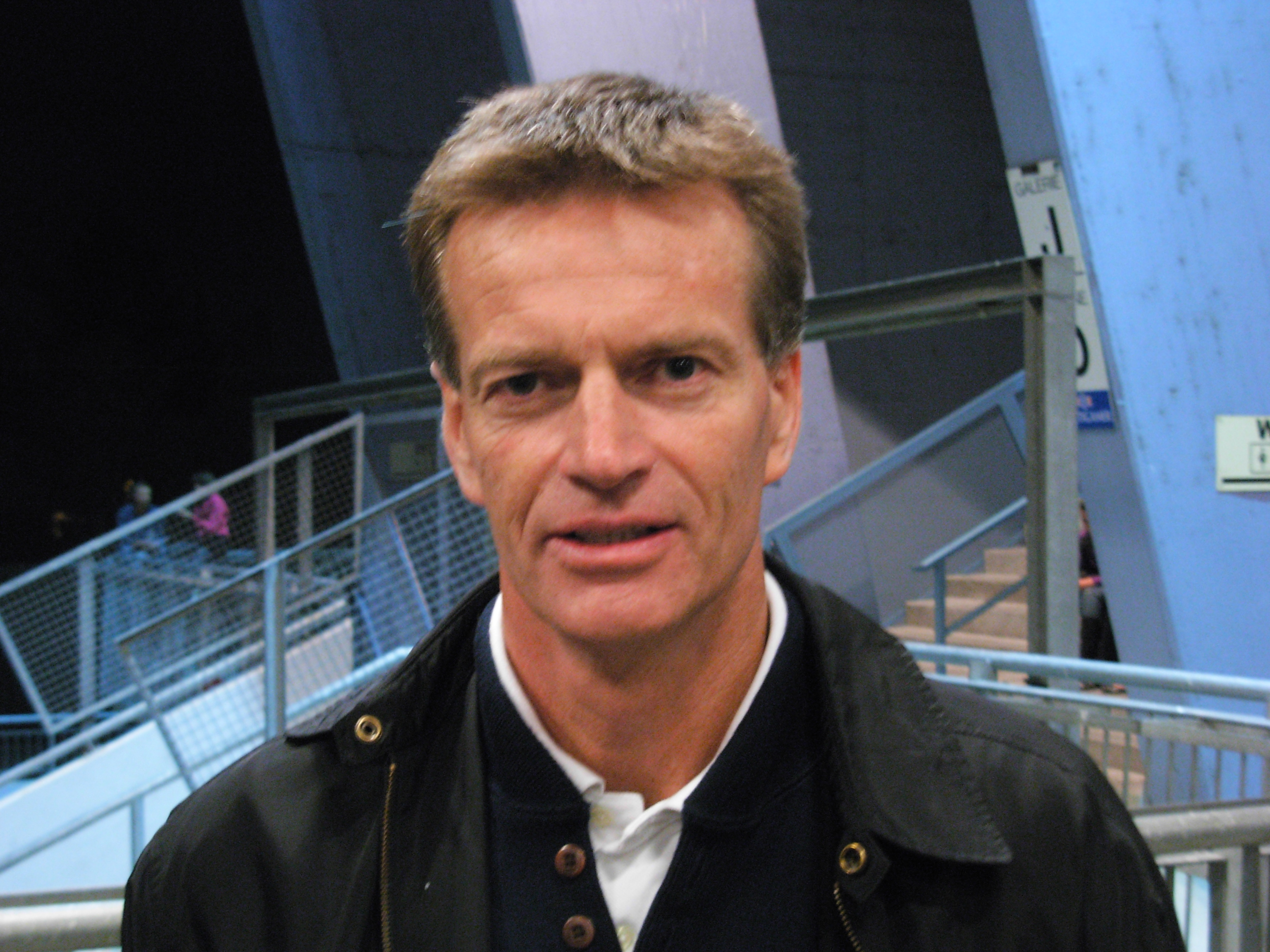 Bill Gilligan, Trainer der Graz 99ers